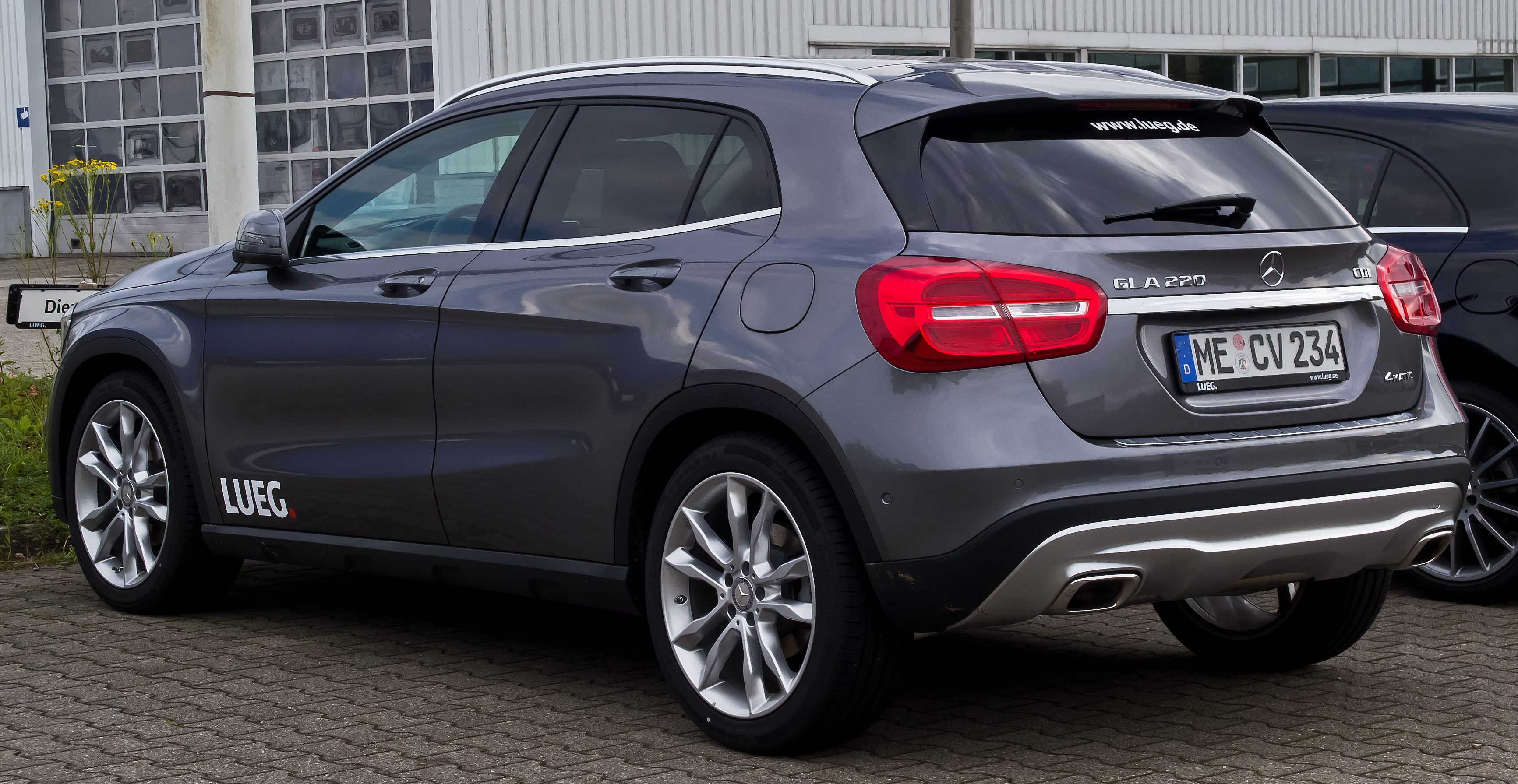 Mercedes-Benz GLA 220 CDI 4MATIC Urban (X 156)